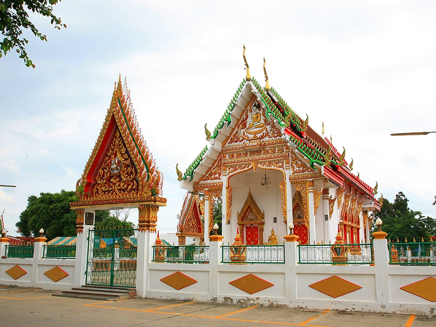 รูปโบสถ์ของวัดคลองพุทรา